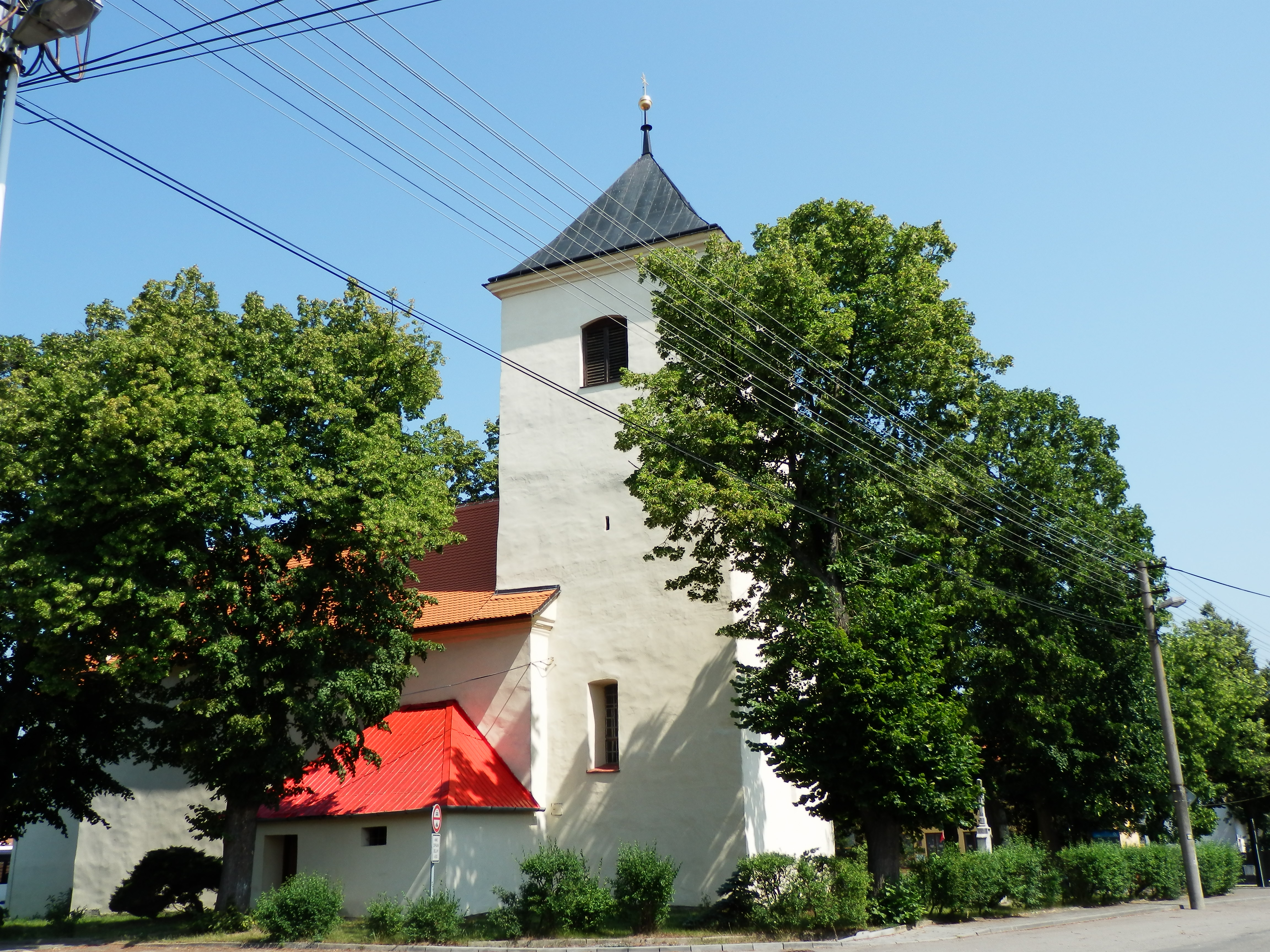 Kostel Nanebevzetí P. Marie (Svatoslav), Svatoslav